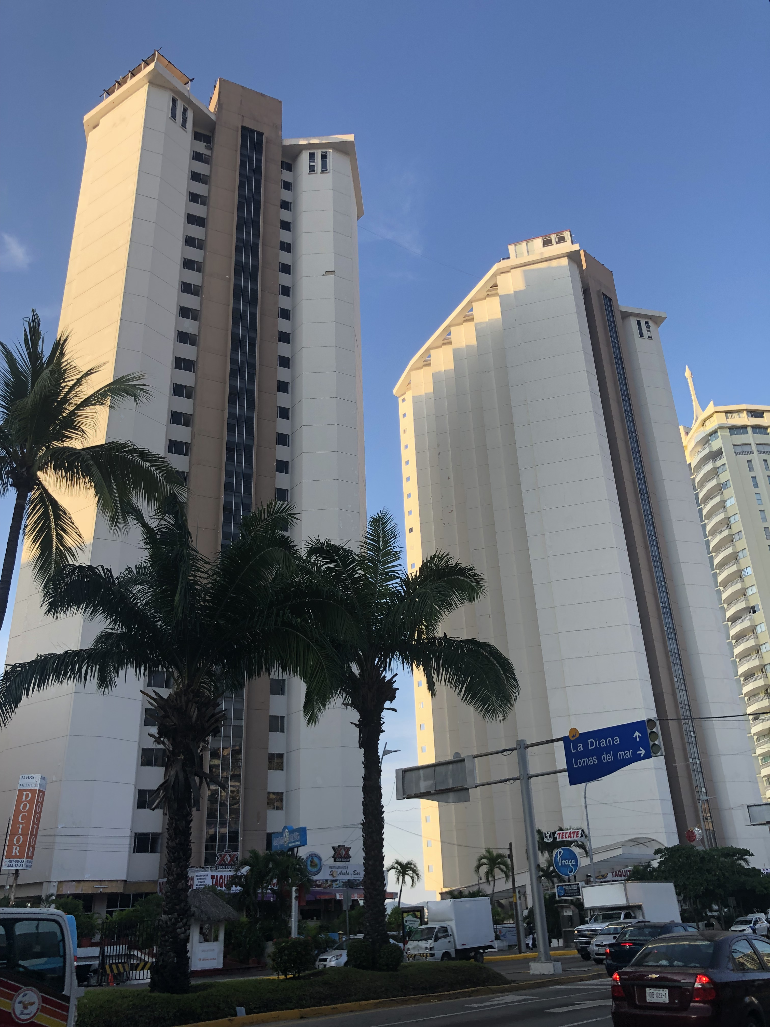 Torres Gemelas Acapulco